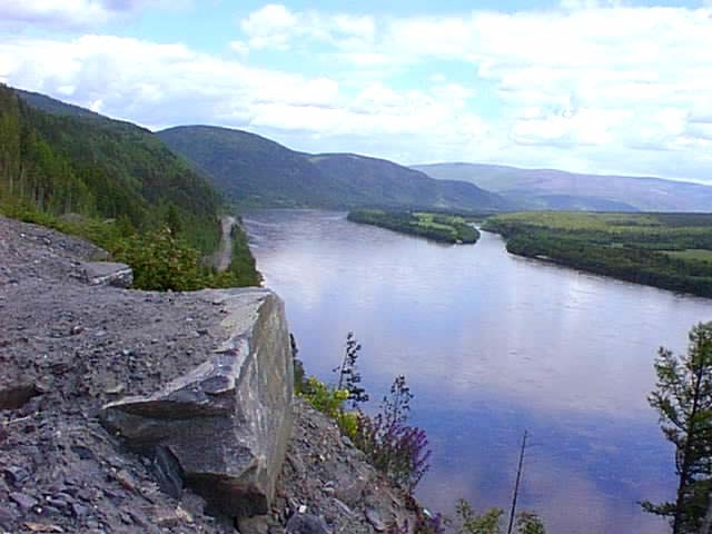 р. Витим